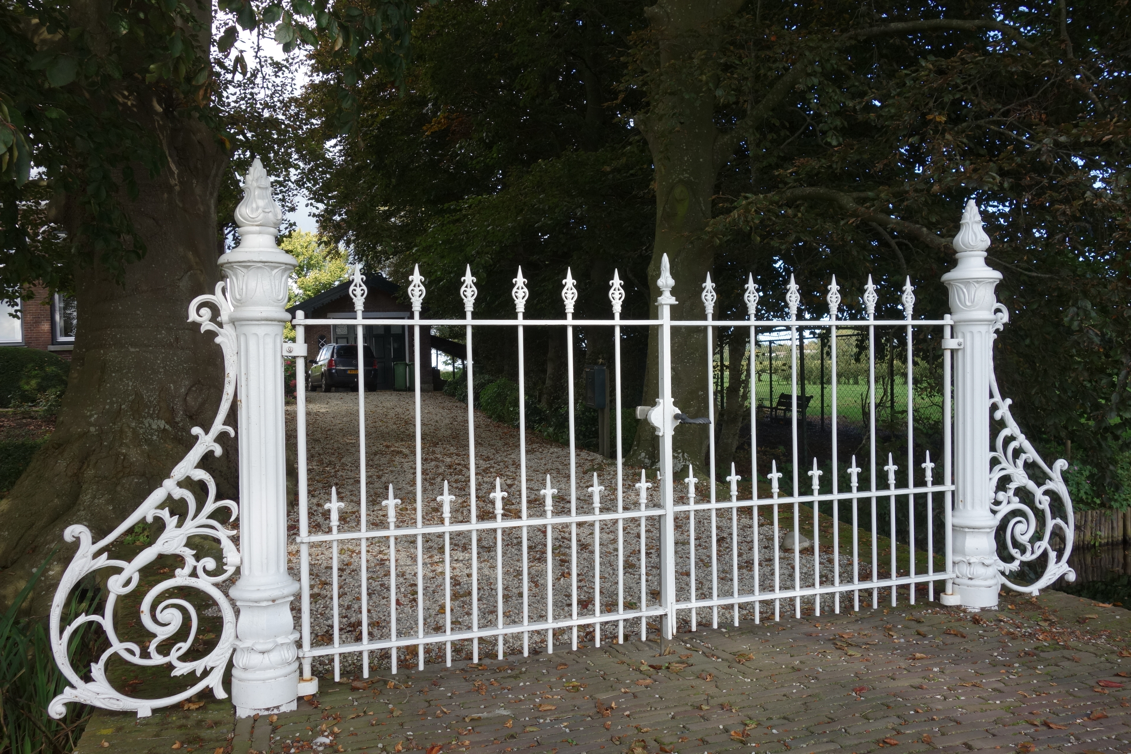 Toegangshek van de voormalige burgemeestewoning Mariënhof.